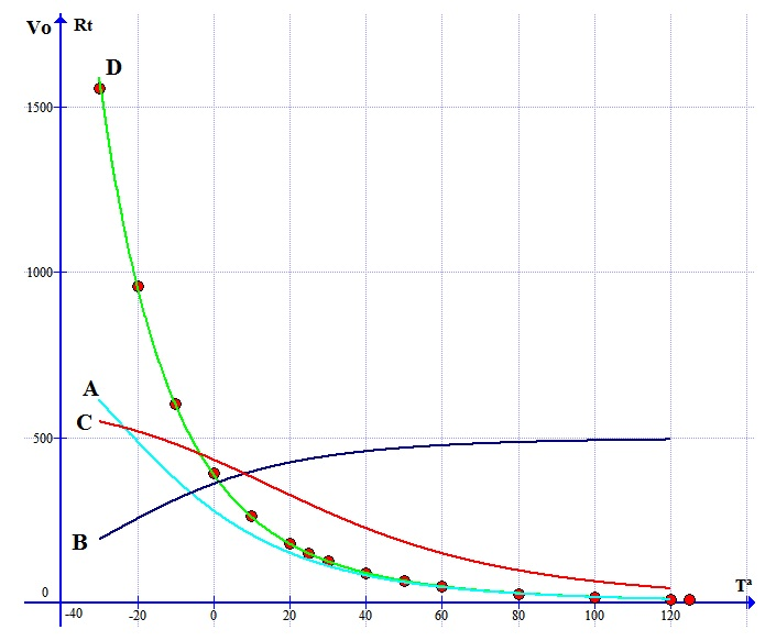 Curvas de linealizacion de un termistor NTC para diferentes circuitos de conexion.